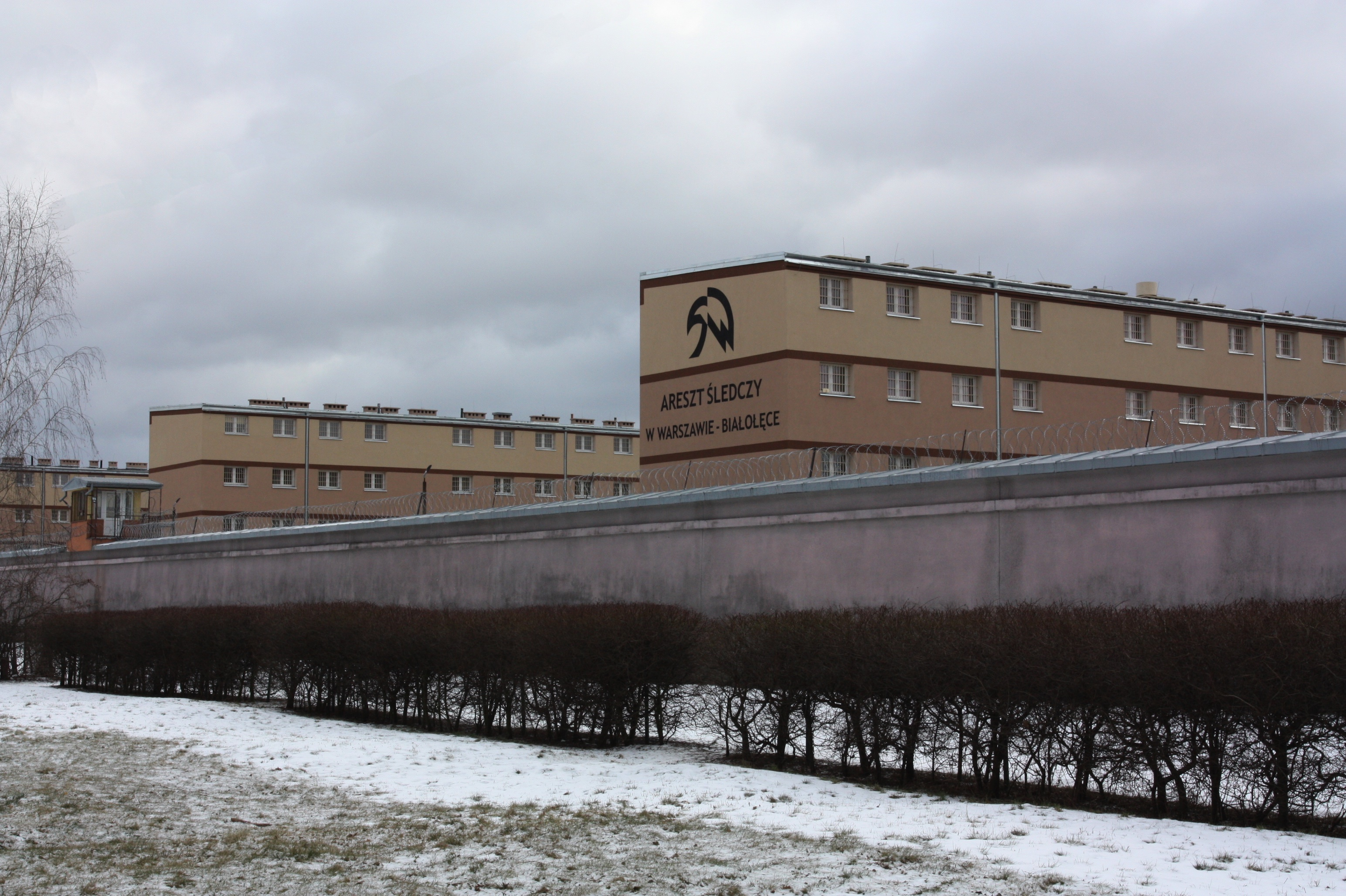 Widok na pawilony Aresztu Śledczego na Białołęce w Warszawie